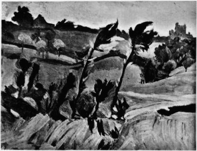 Campagne romaine. 1900-1920.